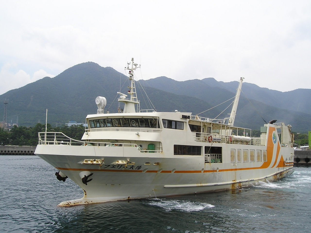 Kuchinoerabujima island.